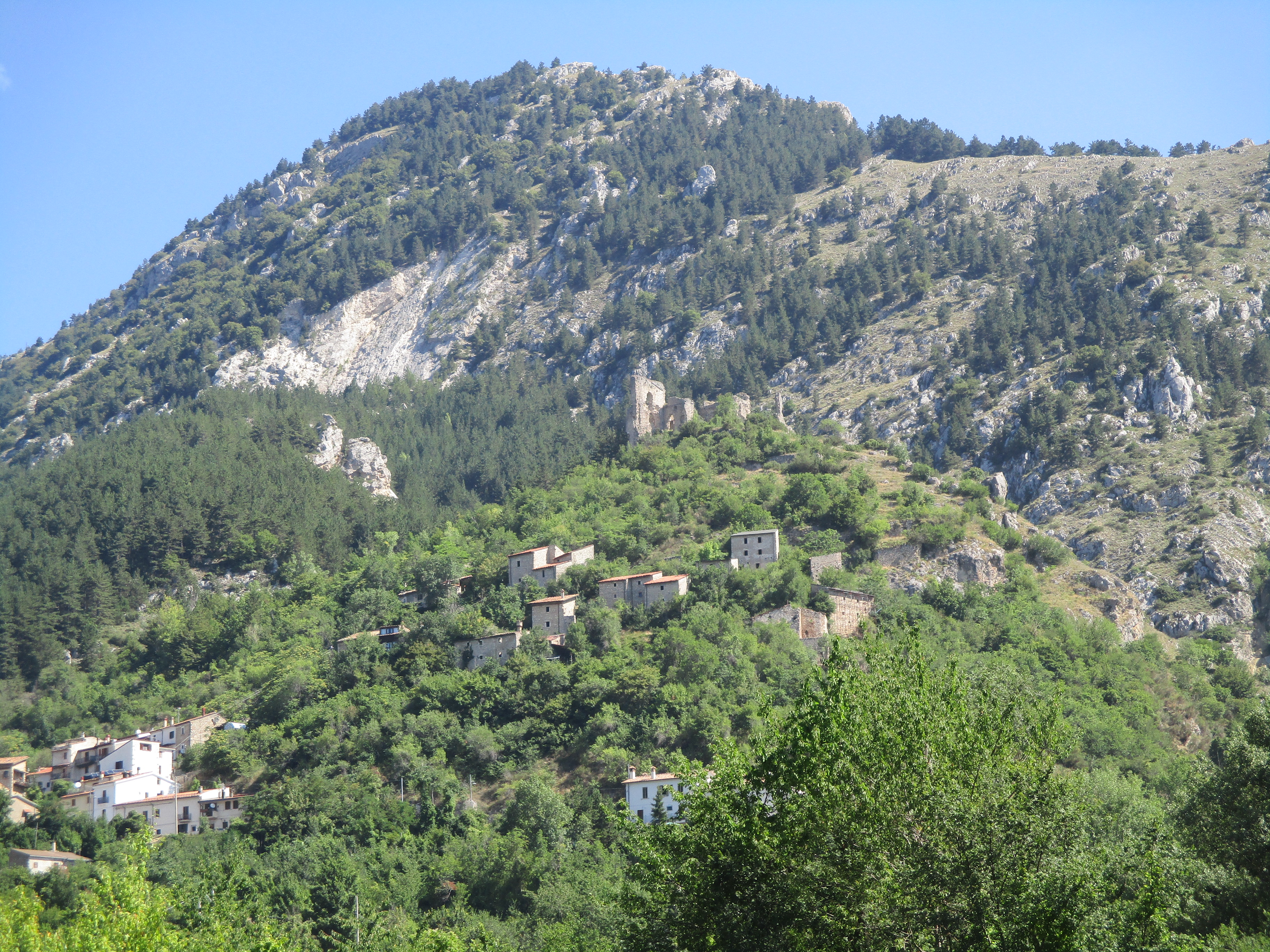 Veduta dei ruderi del castello